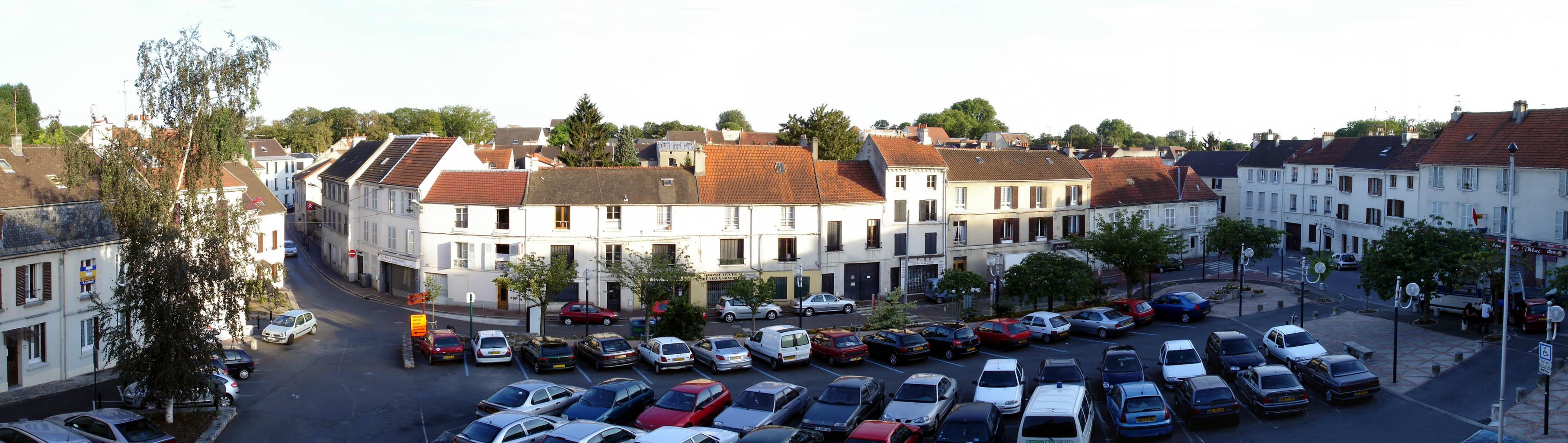 Panoramique de la place du 8 Mai 1945 à Gonesse (Val-d'Oise), France